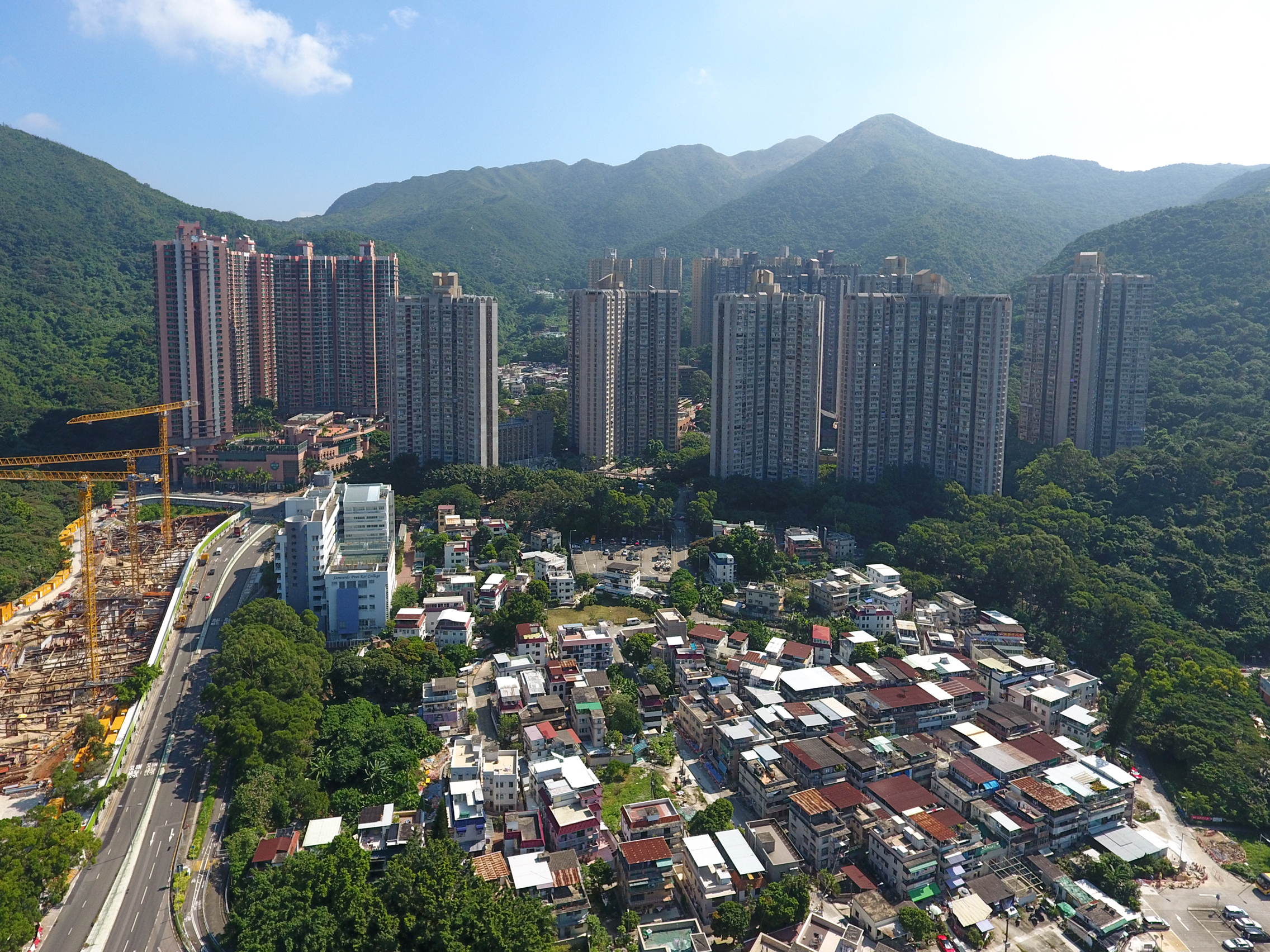 Siu Lek Yuen